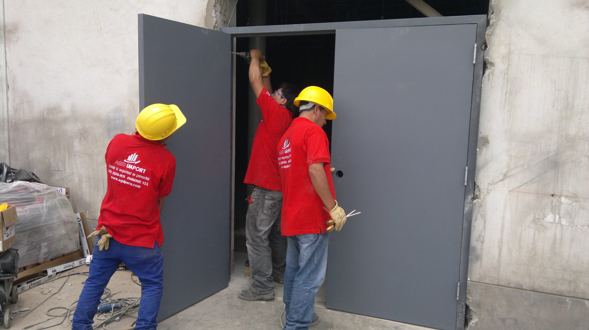 Puerta cortafuego DOBLE HOJA Telf. 2600539 Cel. 948669682 / 997450405